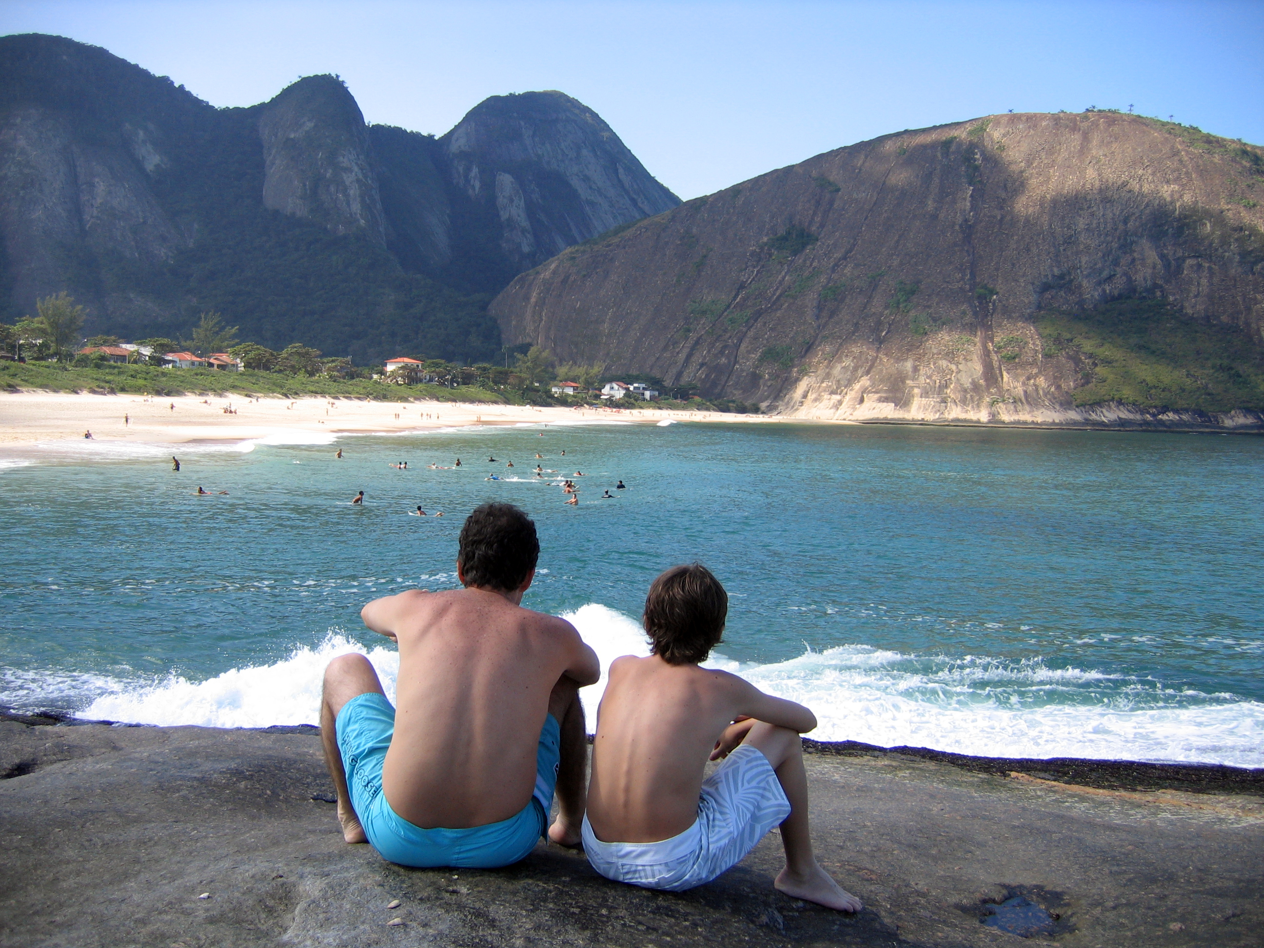 Eu e o miguel olhando a praia (Itacoatiara - Niterói-RJ)